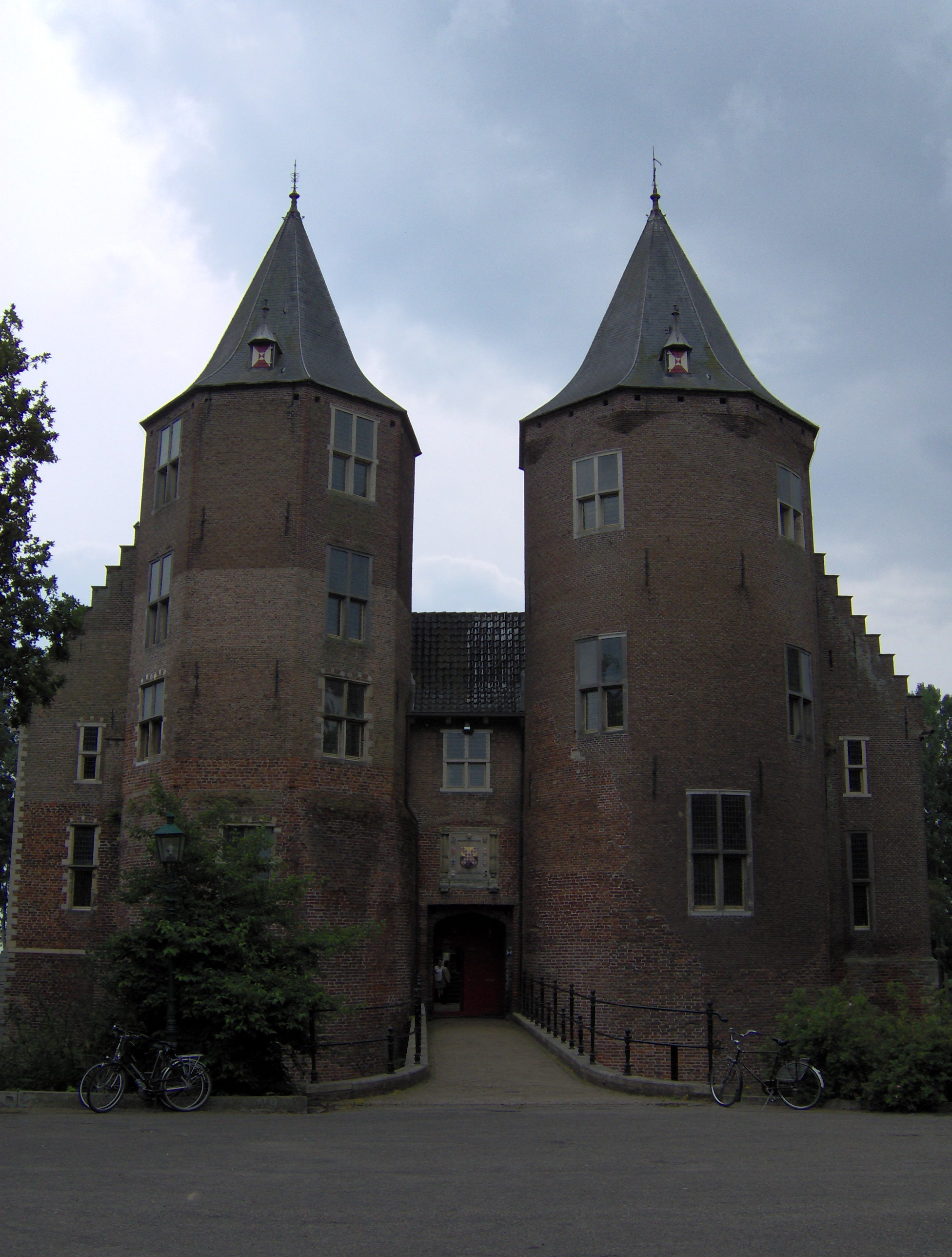 eigen foto